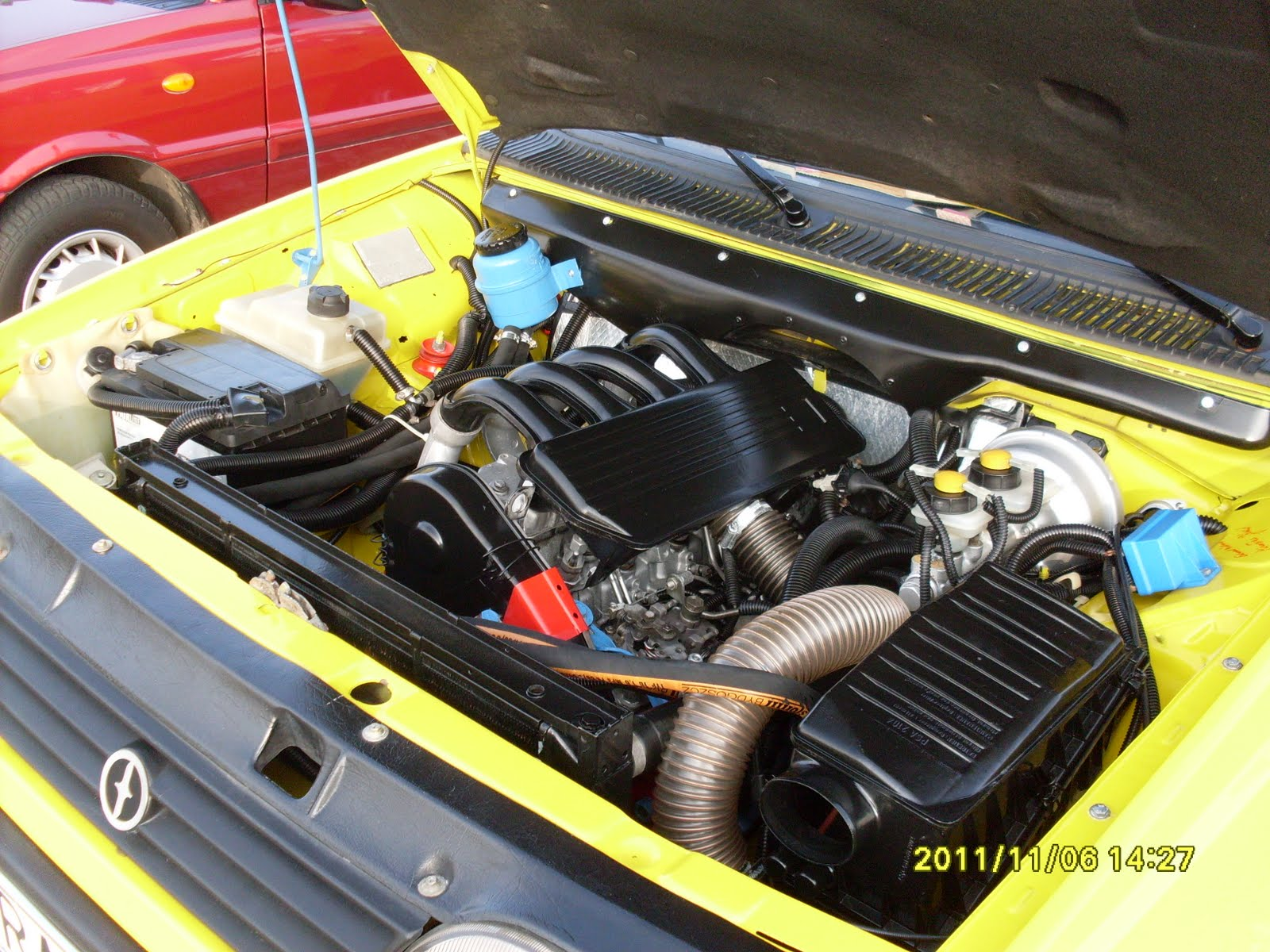 Silnika 1.9 GLD (Diesel) XUD9A FSO Poloneza Caro MR'93.